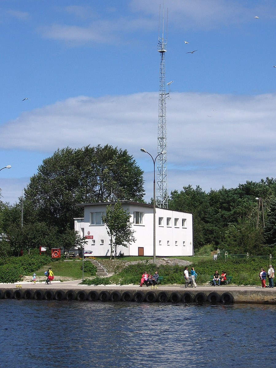 Bosmanat portu w Mrzeżynie (zachodniopomorskie)